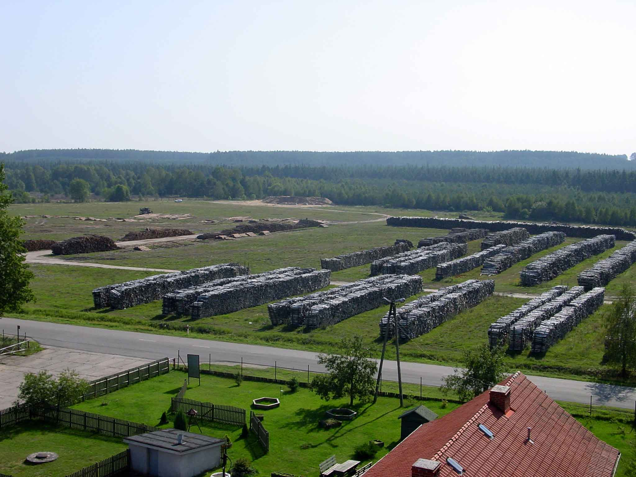 Gmina Tychowo, Podborsko – zakład drzewny; autor zdjęcia Kluka; 2003-10-12.